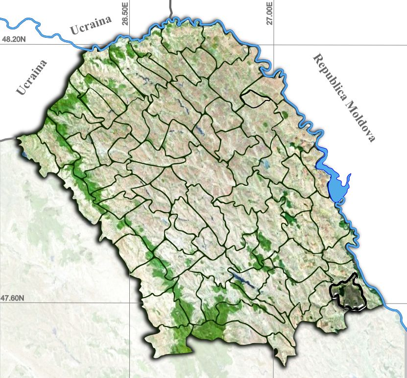 Calarasi jud Botosani.